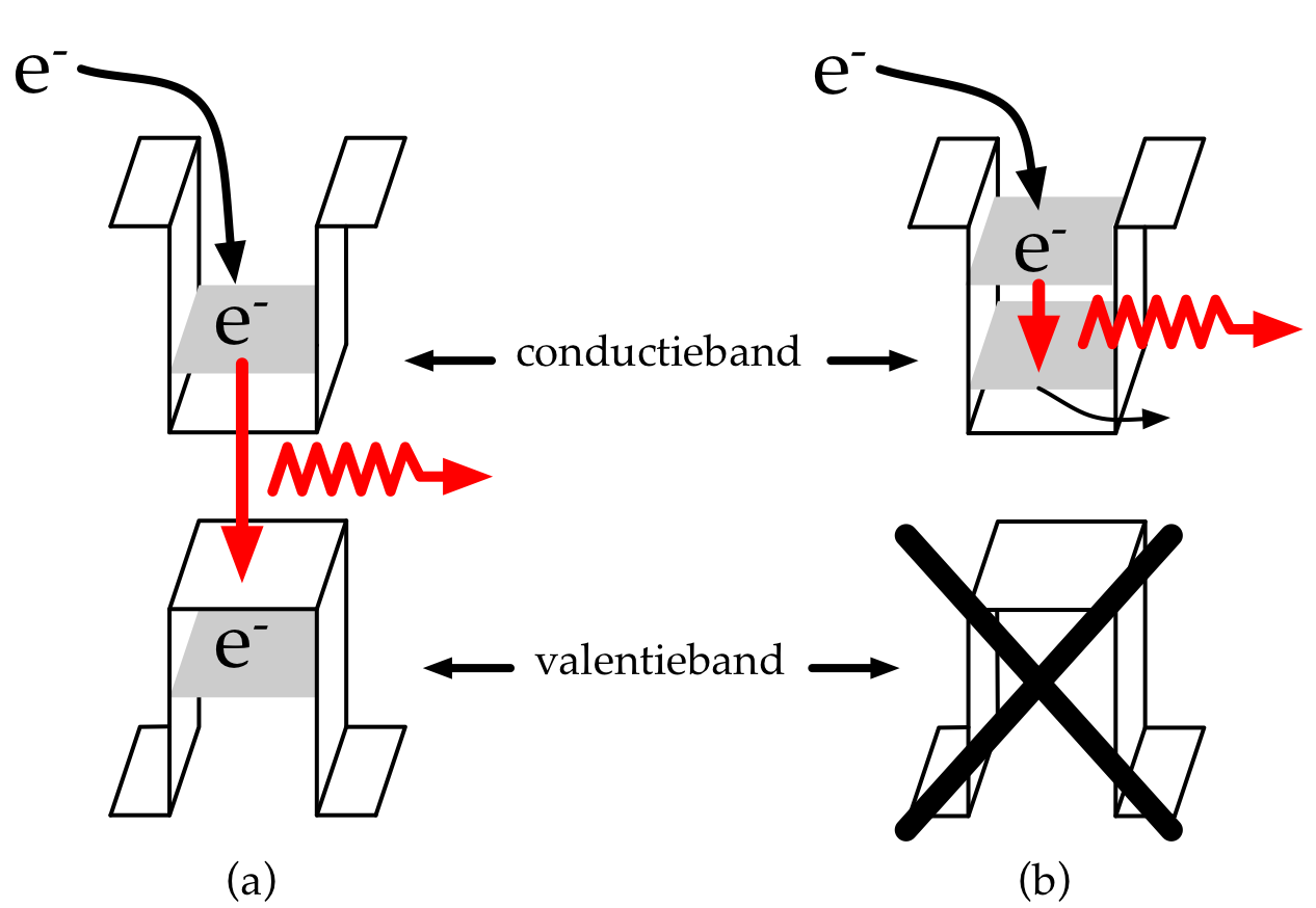 Op deze figuur is duidelijk te zien wat het verschil is tussen de klassieke halfgeleiderlasers (a) en de kwantumcascadelasers (b). De rode zigzagpijl duidt het uitzenden van een foton aan bij respectievelijk interband- en intersubbandtransitie. Creator: Yannick Clybouw